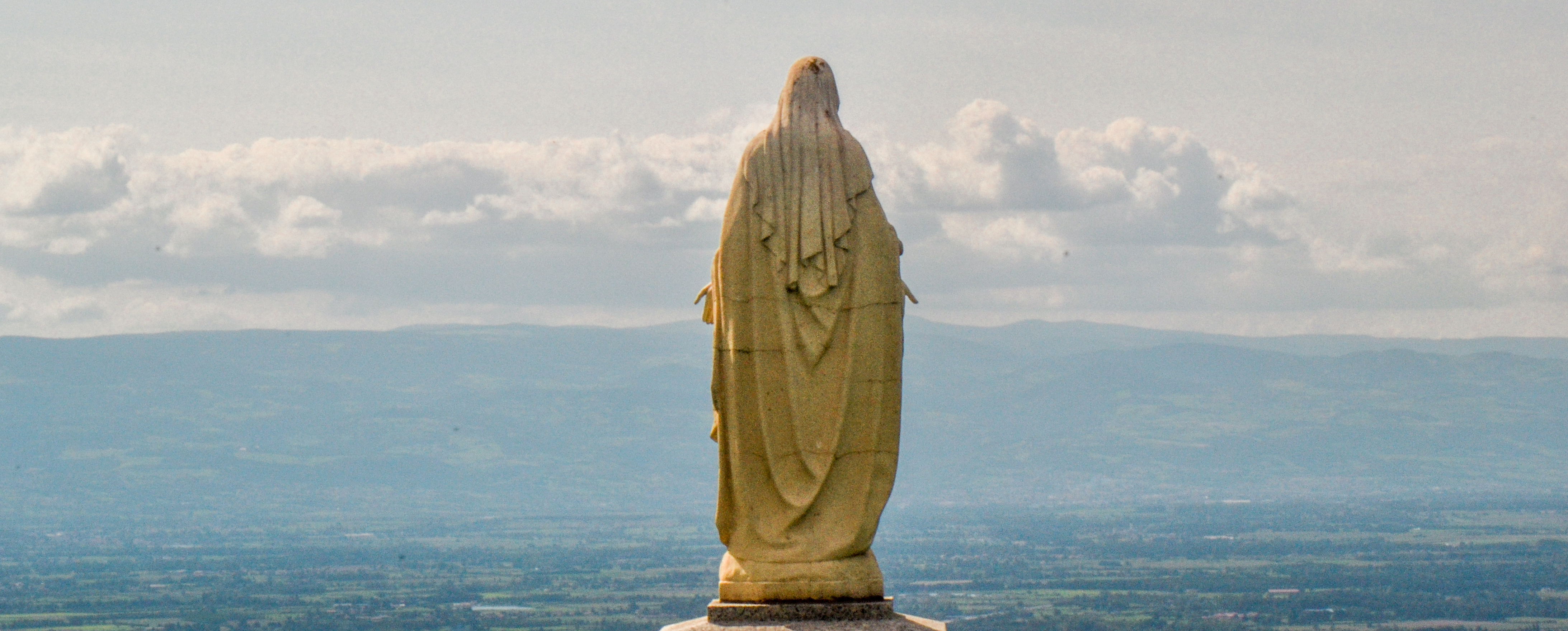 Vue de dos de la Madone de Saint-Héand. Face à la plaine du Forez.